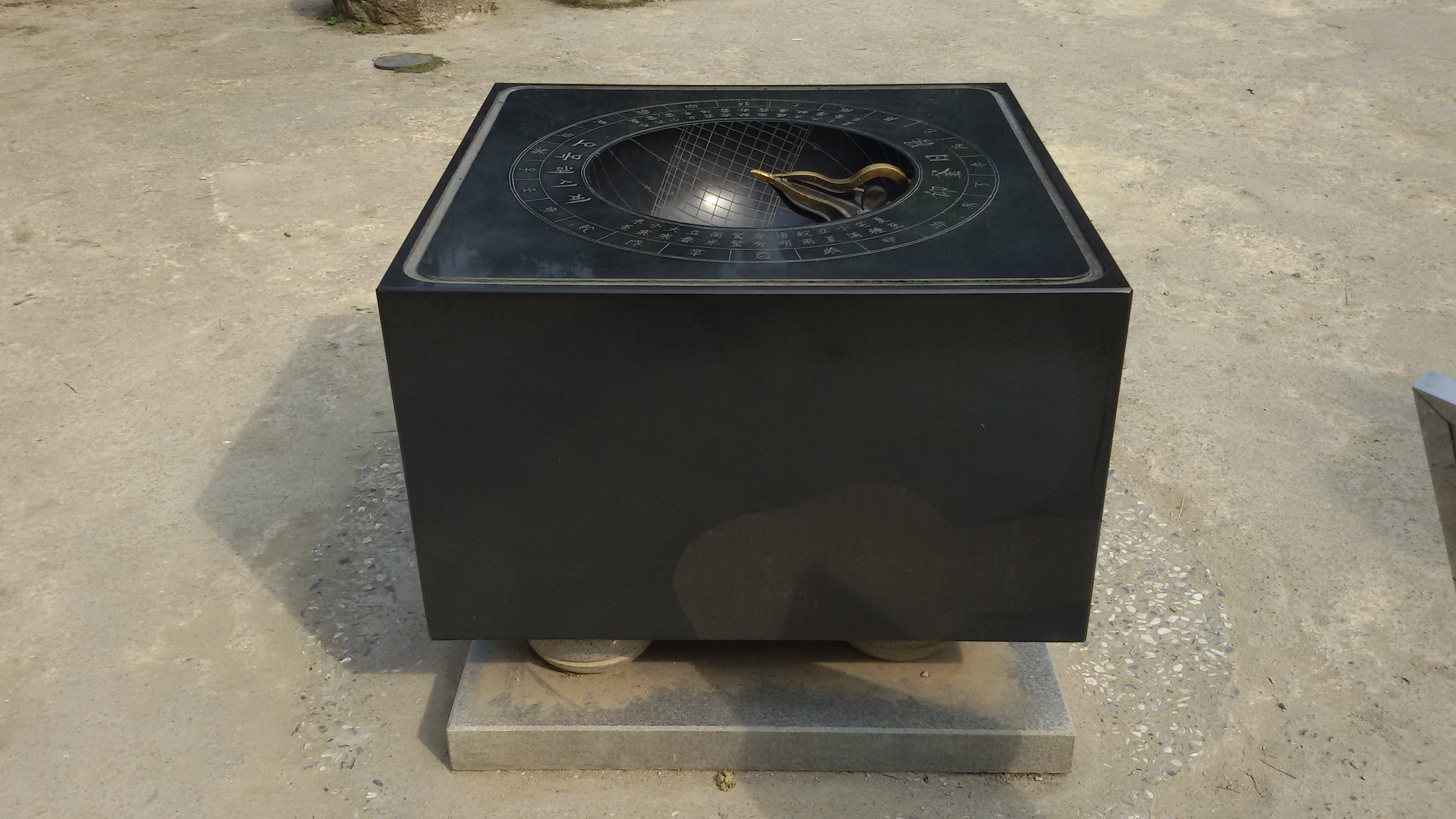 粵語: 喺廣州越秀山海東京畿園入面嘅仰釜日晷擺設品